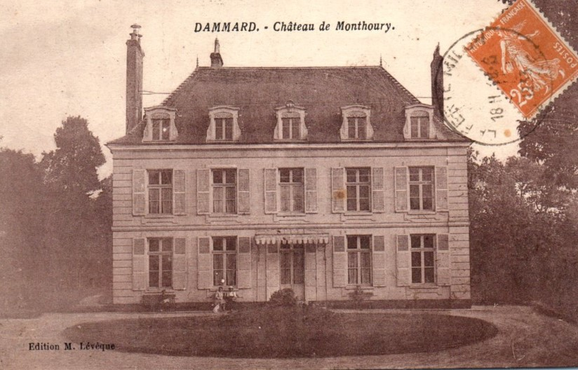 Chateau de monthoury carte postale début XXe siècle.